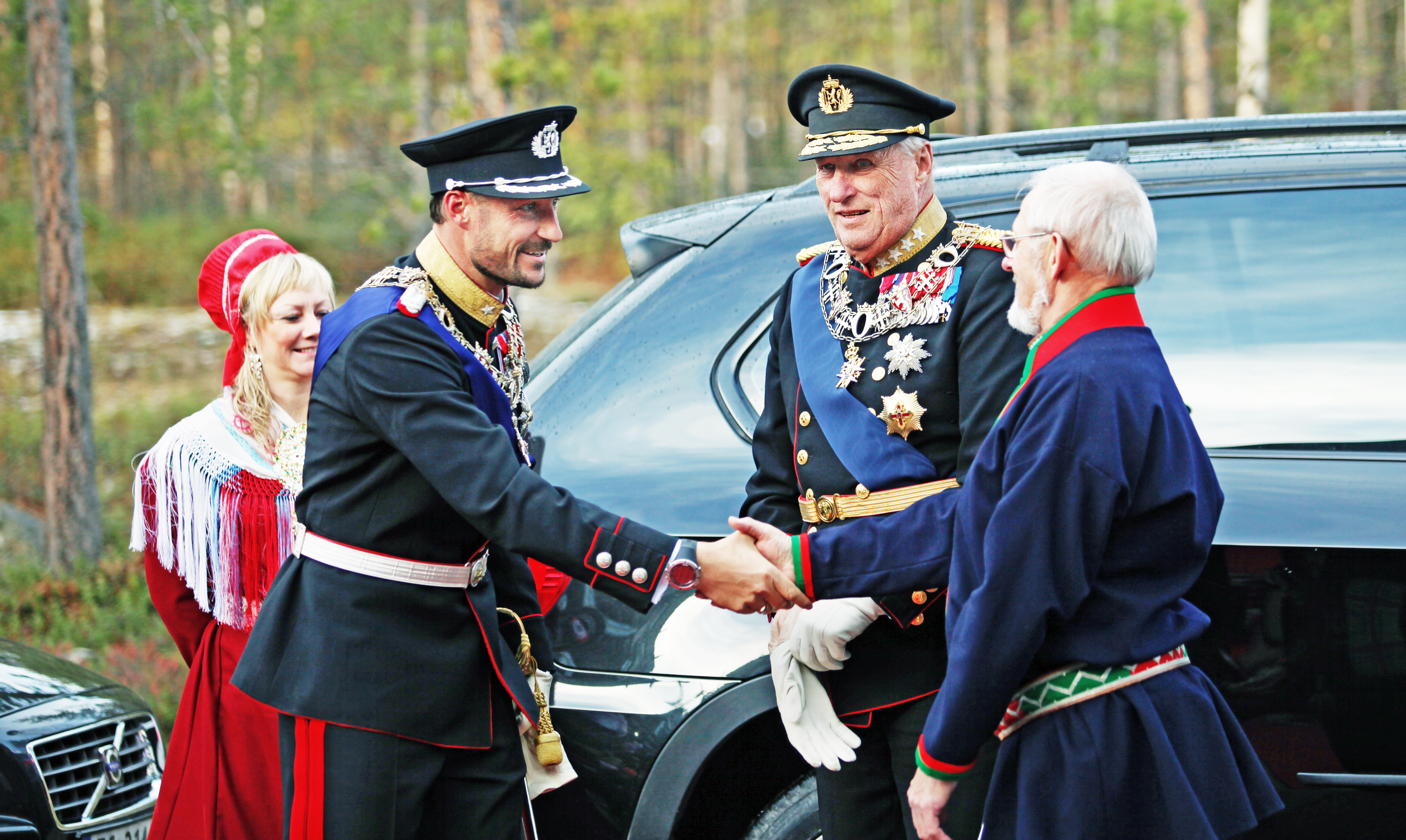 Hans Majestet Kong Harald, Hans Kongelige Høyhet Kronprins Haakon og ordfører Anne Toriil Eriksen Balto tas imot av avtroppende plenumsleder Jarle Jonassen ved åpningen av Sametinget 2013. Foto: Kenneth Hætta